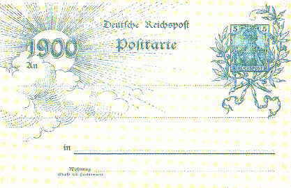 Die Deutsche Reichspost Postkarte, 5 pf., 1900